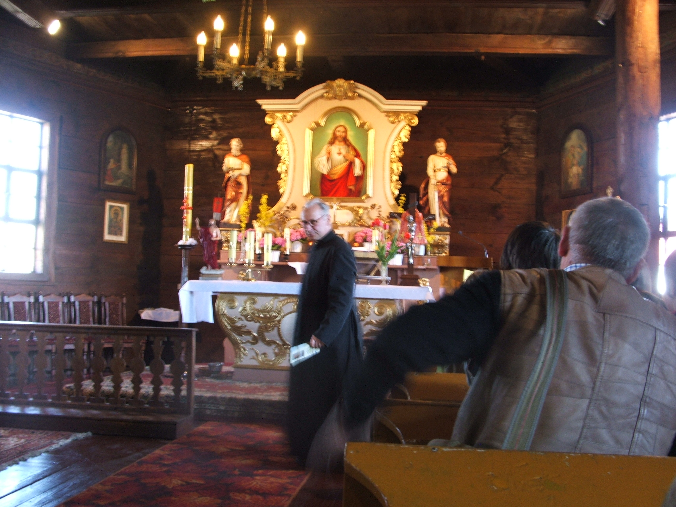 Rejowiec - dawny zbór kalwiński obecnie kościół rzym.-kat. fil. p.w. Serca Jezusa